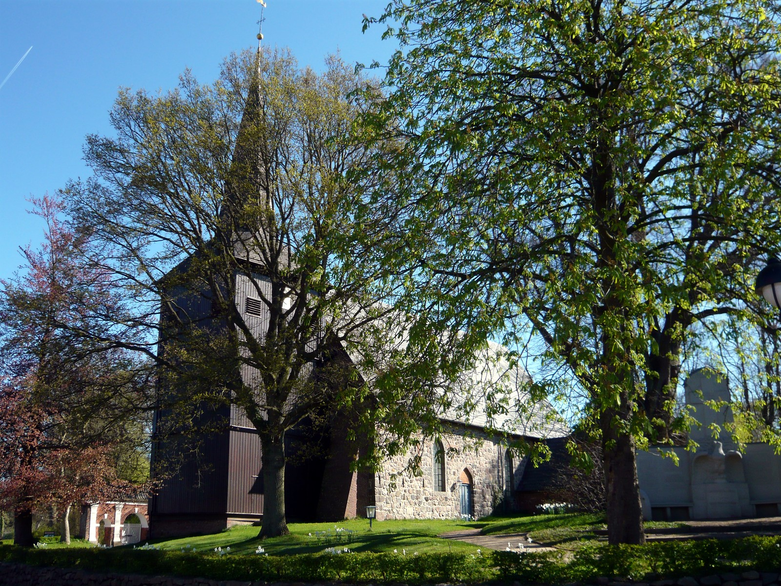 Die Maria-Magdalenen-Kirche in Bovenau aus dem 13. Jahrhundert. Der hölzerne Turm stammt aus dem 18. Jahrhundert.